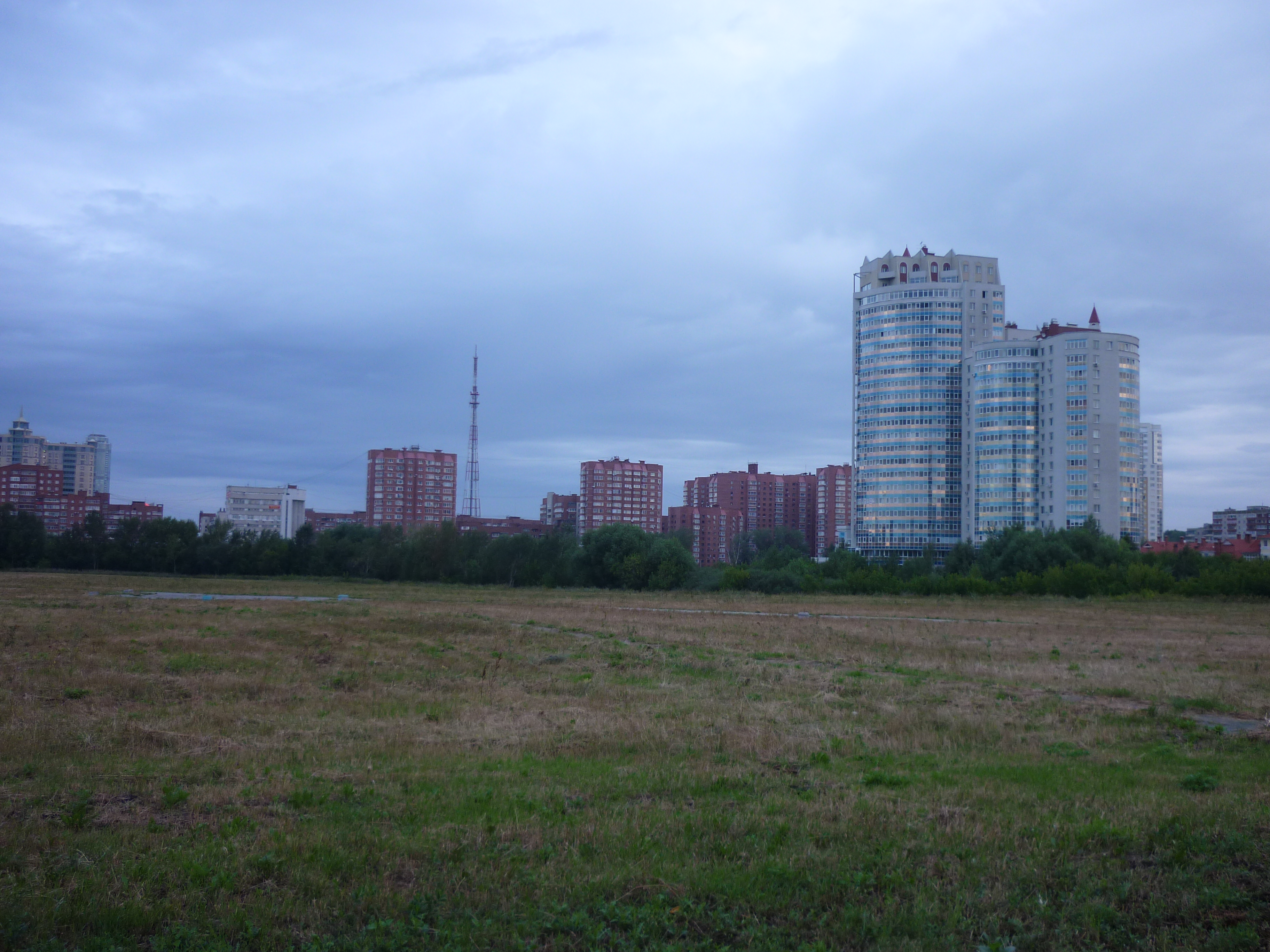 Пустырь на ул. Фурманова, вид на север недалеко от моста.